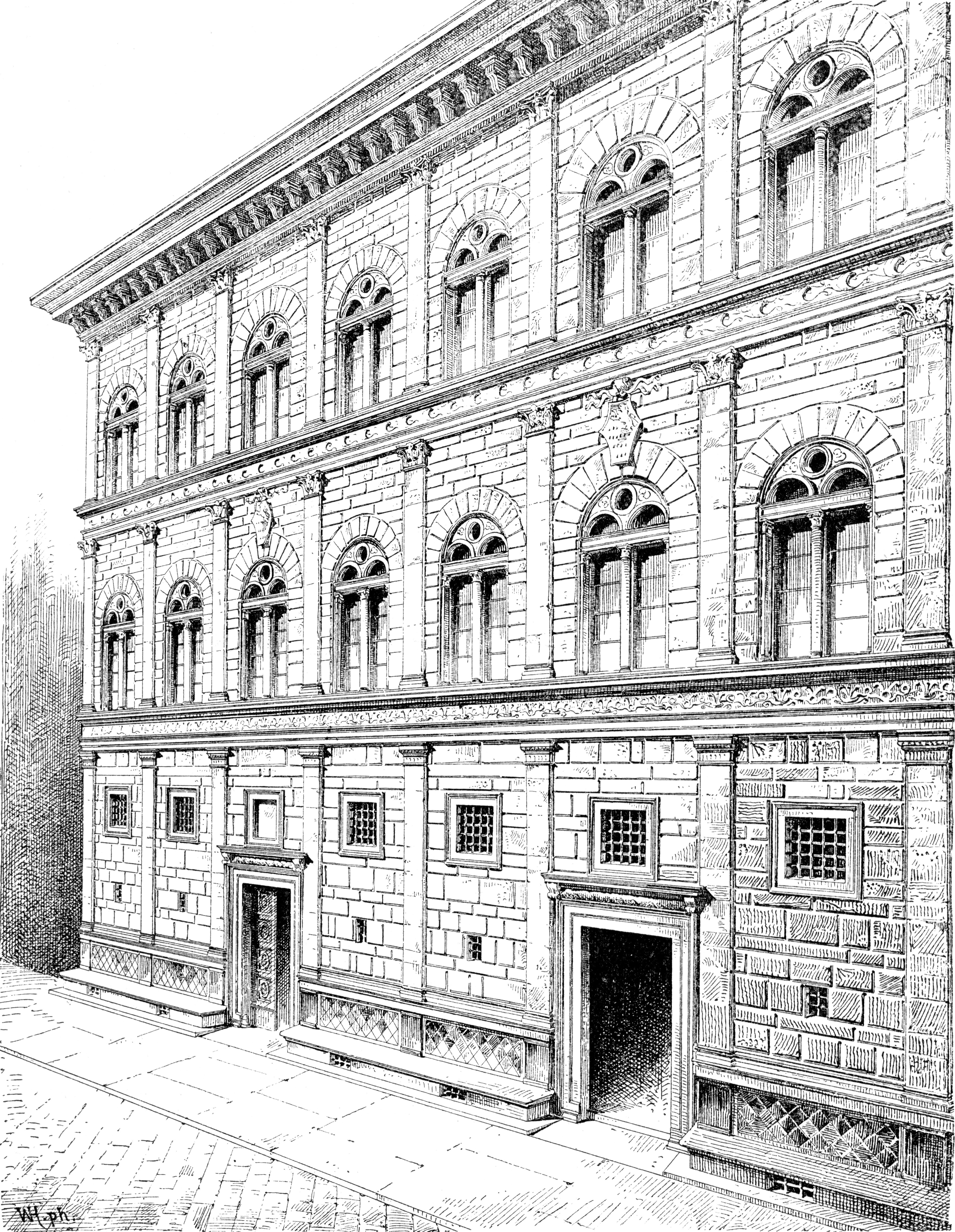 Fassade des Palazzo Rucellai (Leon Battista Alberti), Florenz.